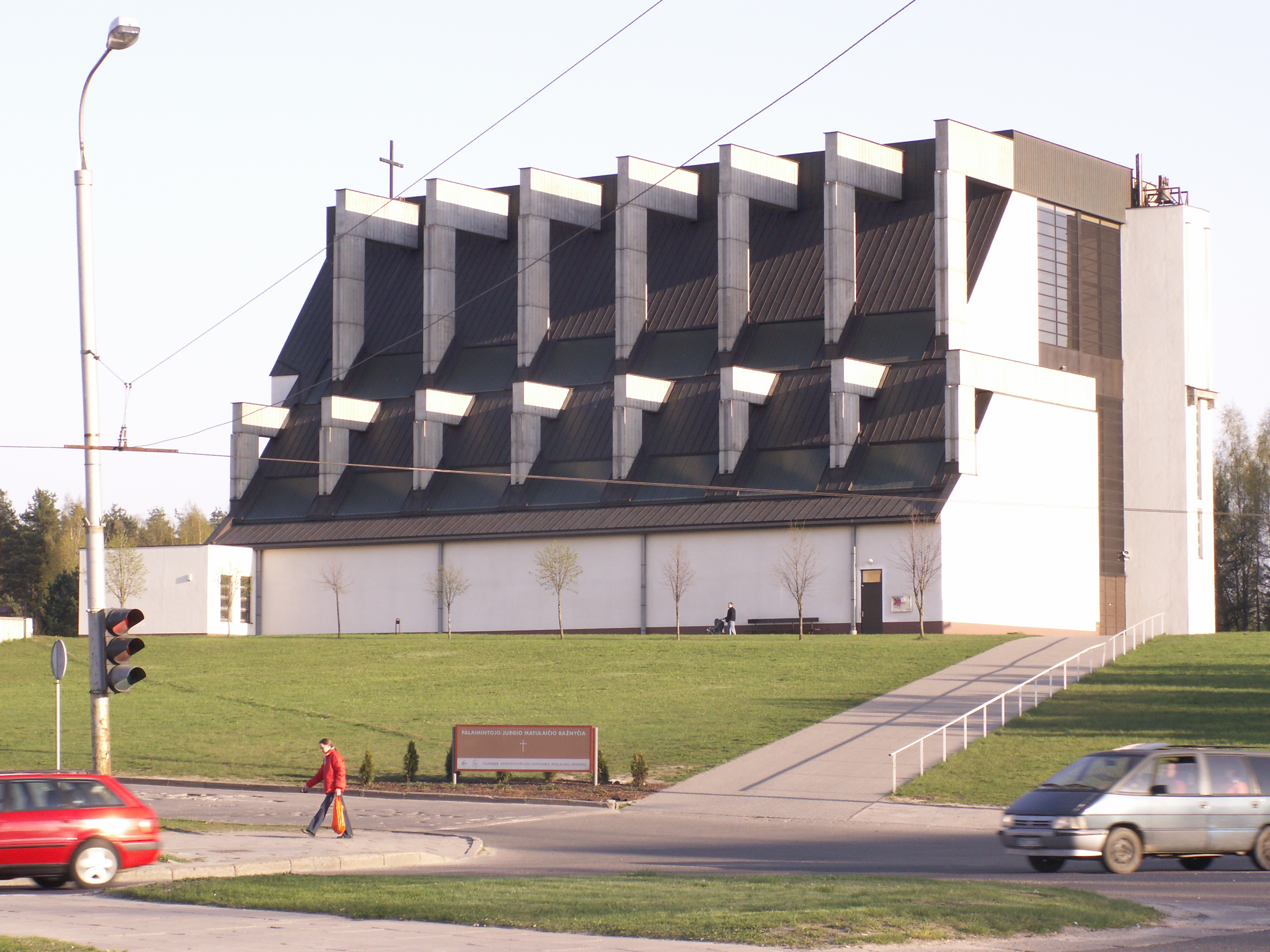 Vilniaus palaimintojo Jurgio Matulaičio bažnyčia